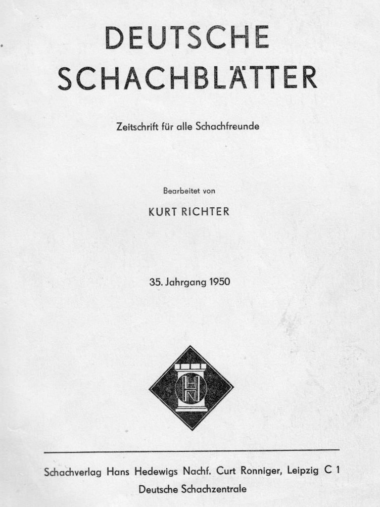 Deutsche Schachblätter, 35. Jahrgang 1950, bearbeitet von Kurt Richter.